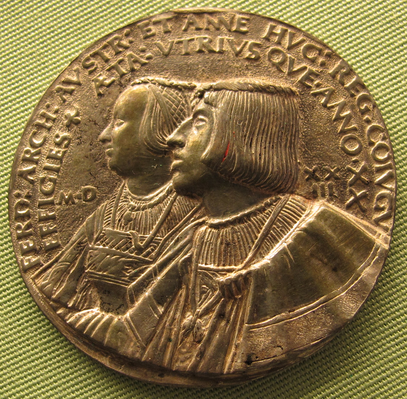 Ferdinando I e Anna di Boemia, 1523